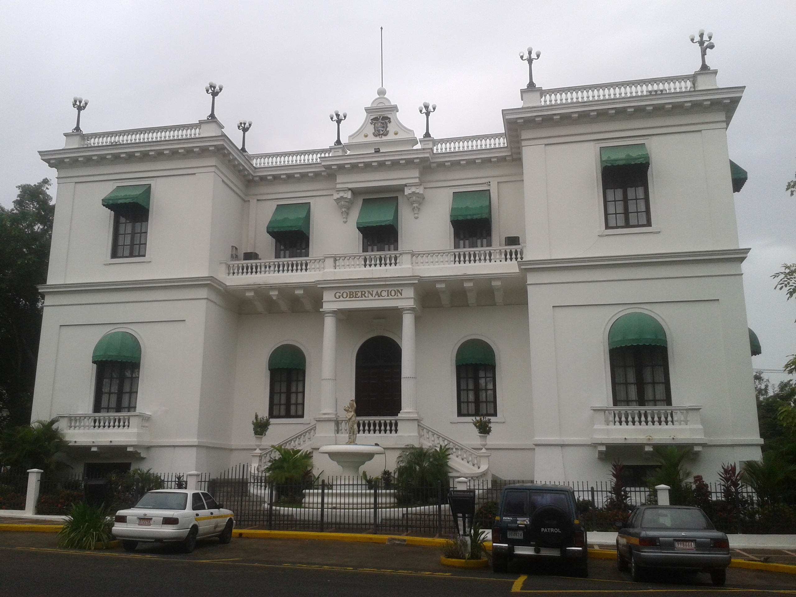 Representa al Órgano Ejecutivo, hace cumplir la Constitución, las Leyes, Los Decretos Ejecutivos y las Resoluciones en la provincia.